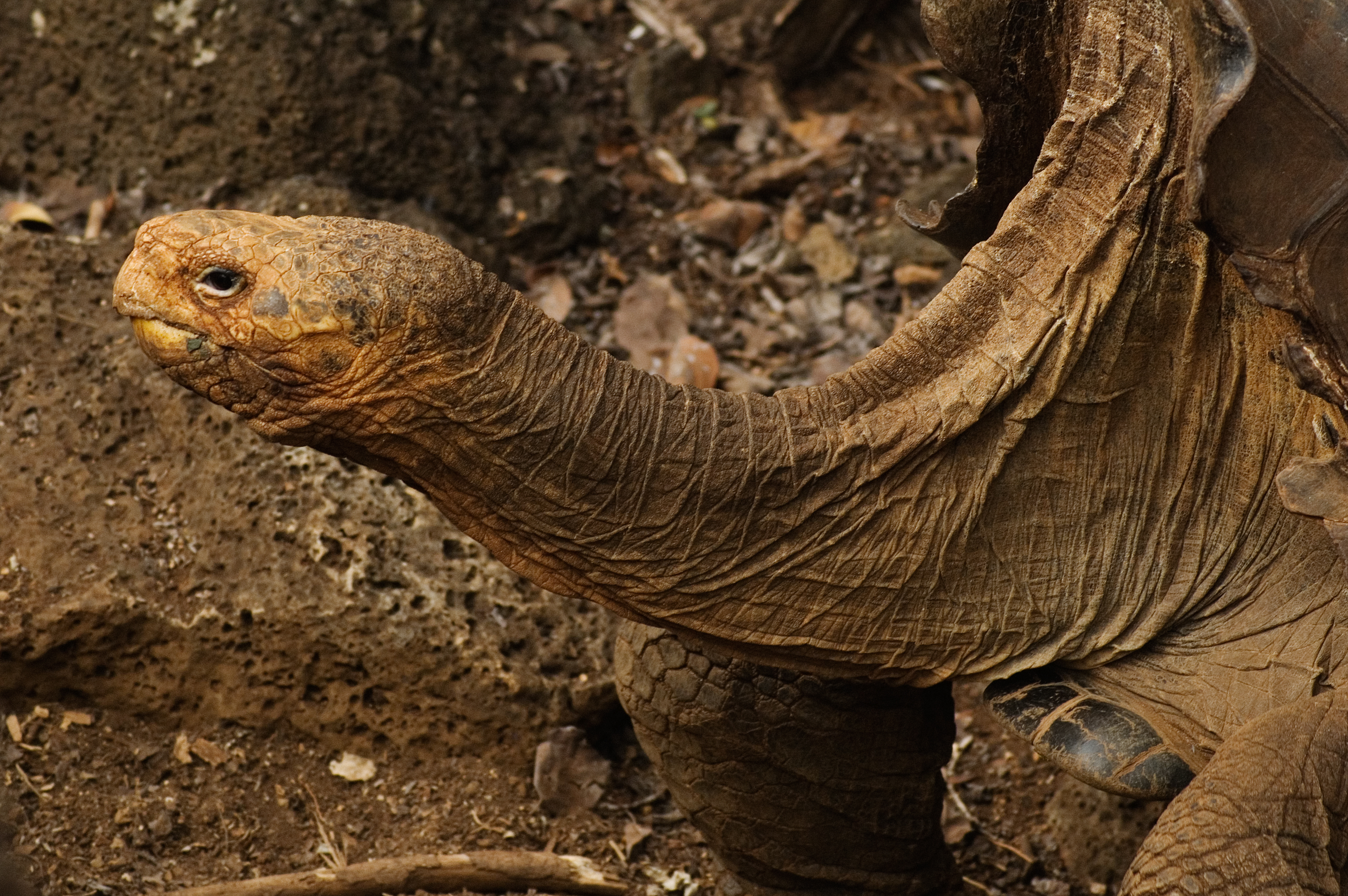 Diego